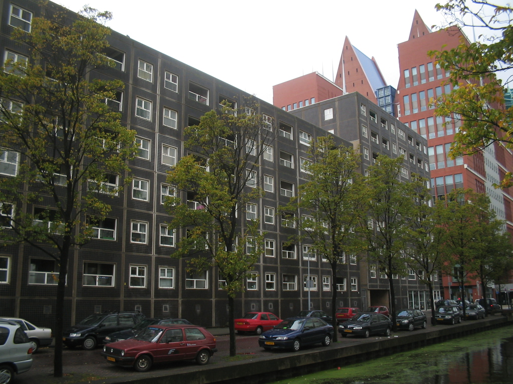 Zwarte madonna, Den Haag, Netherlands, 21 oktober 2005